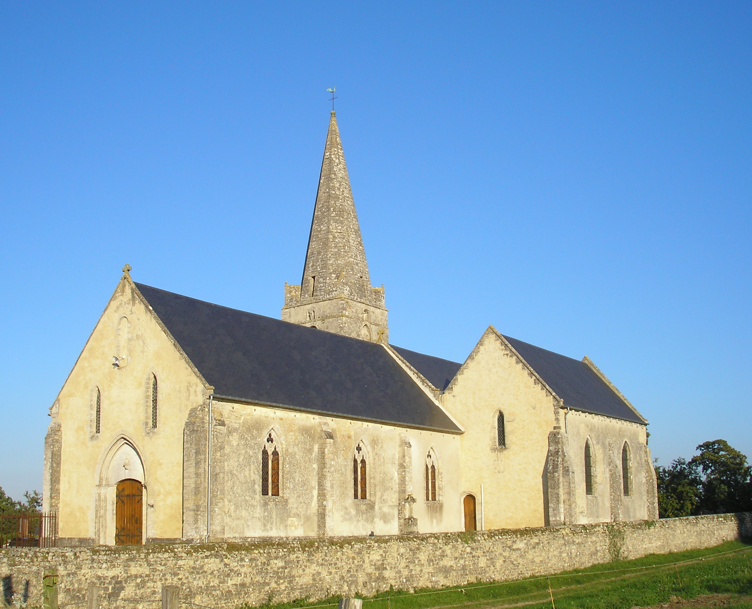 Campigny (Normandie, France). L'église Notre-Dame.